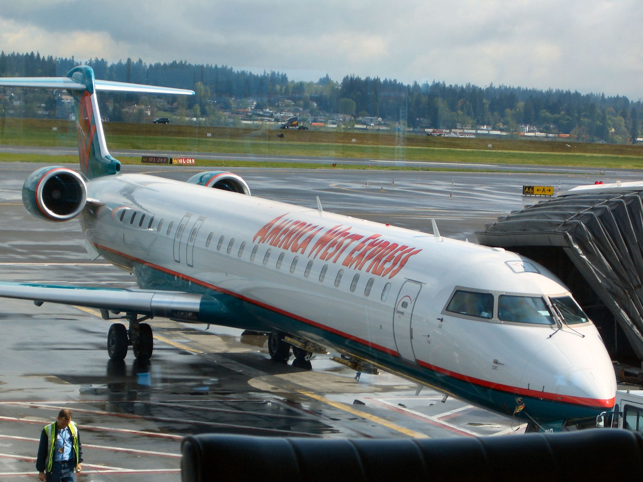 America Jet Express - Canadair CRJ-900